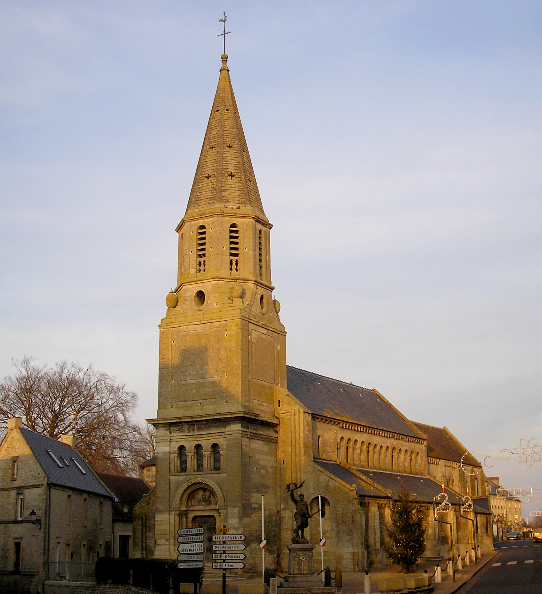 Creully (Normandie, France). L'église Saint-Martin.